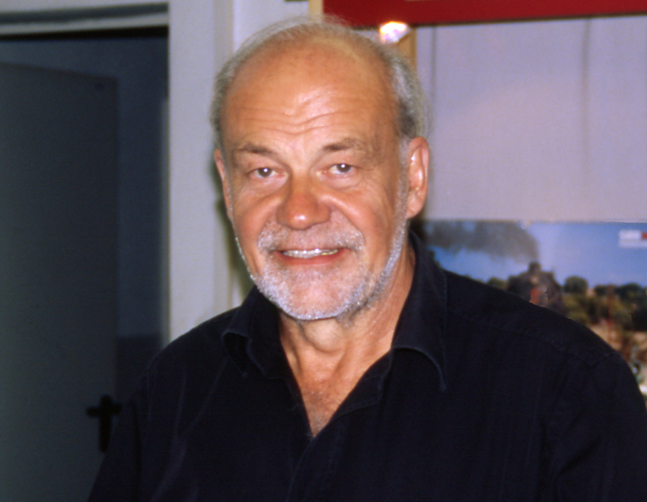 Hagen von Ortloff beim Tag der offenen Tür der Auhagen GmbH am 4. September 2010